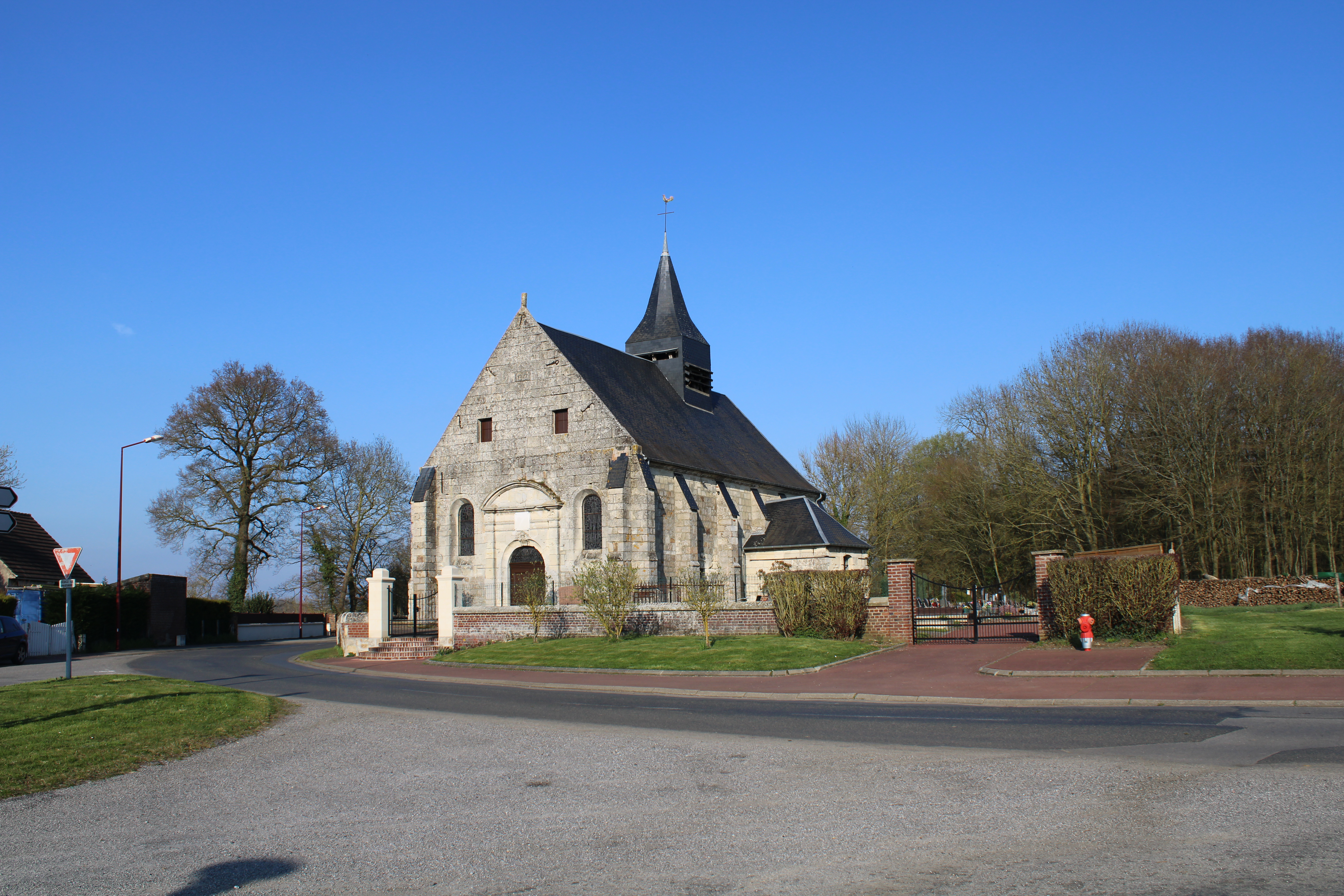 Place de l'église.